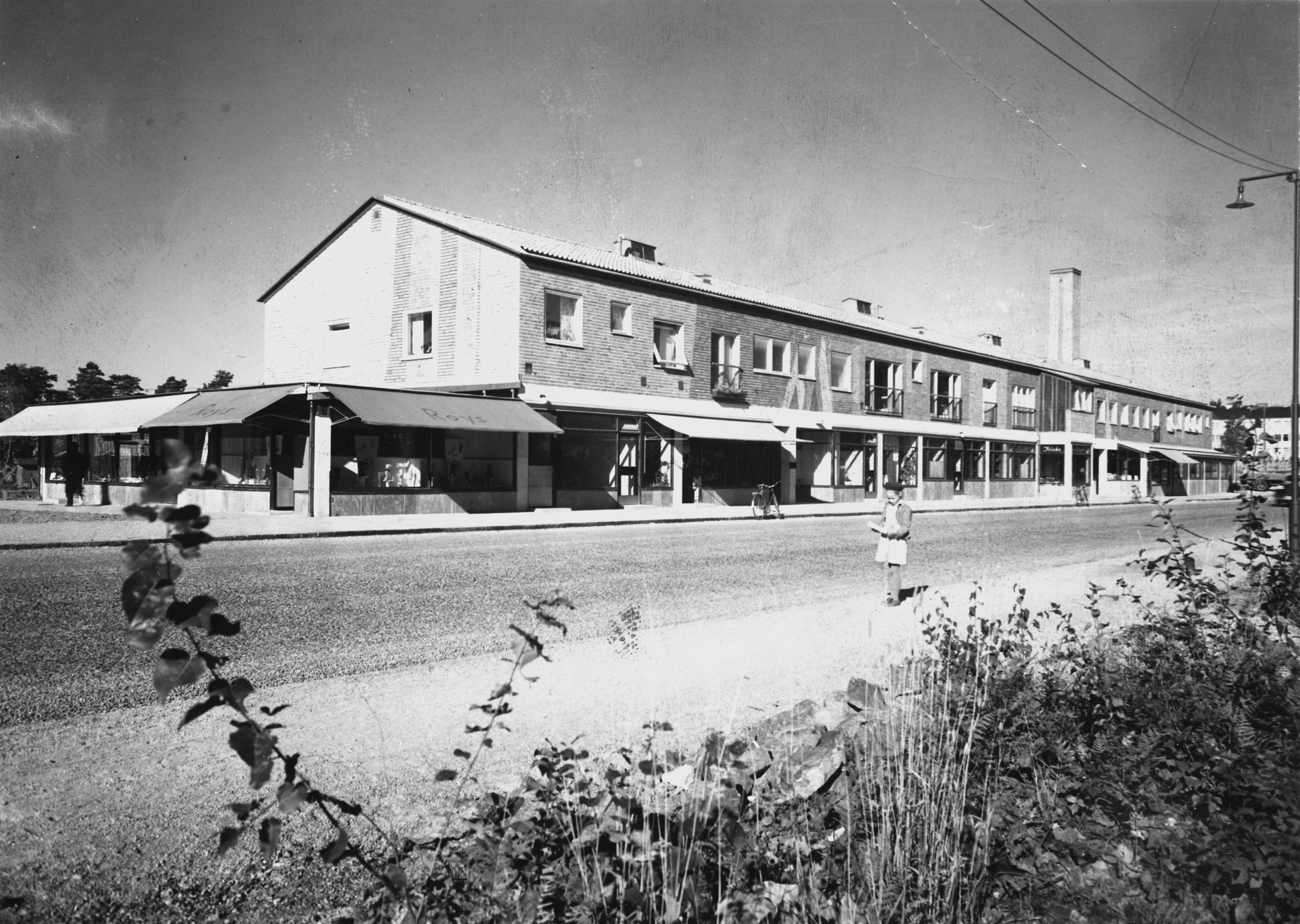 Årsta centrum fotad från korsningen Årstavägen/Hjälmarsvägen. Fotograf Sune Sundahl.